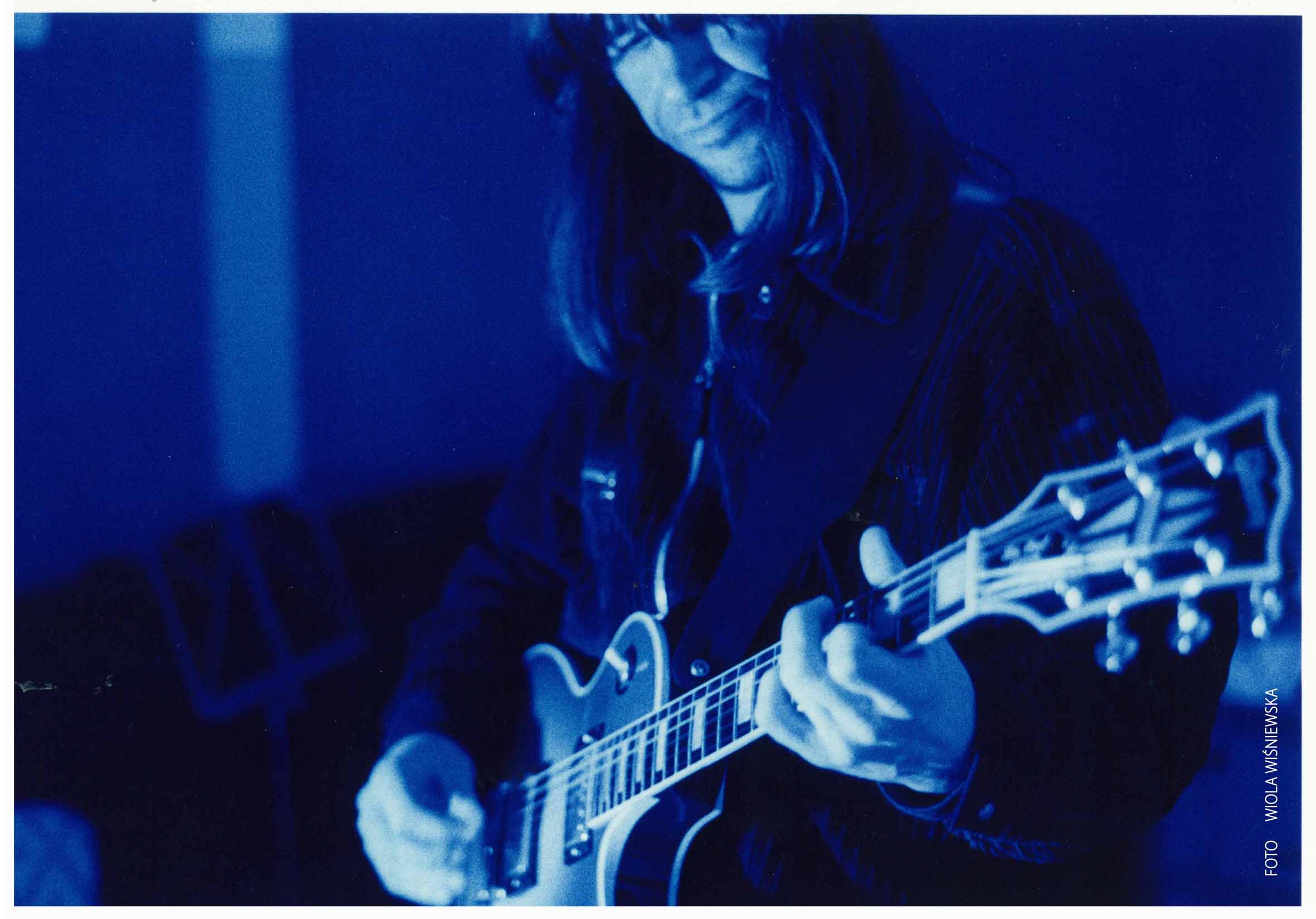 Waldemar Lewandowski, foto Wiola Wiśniewska